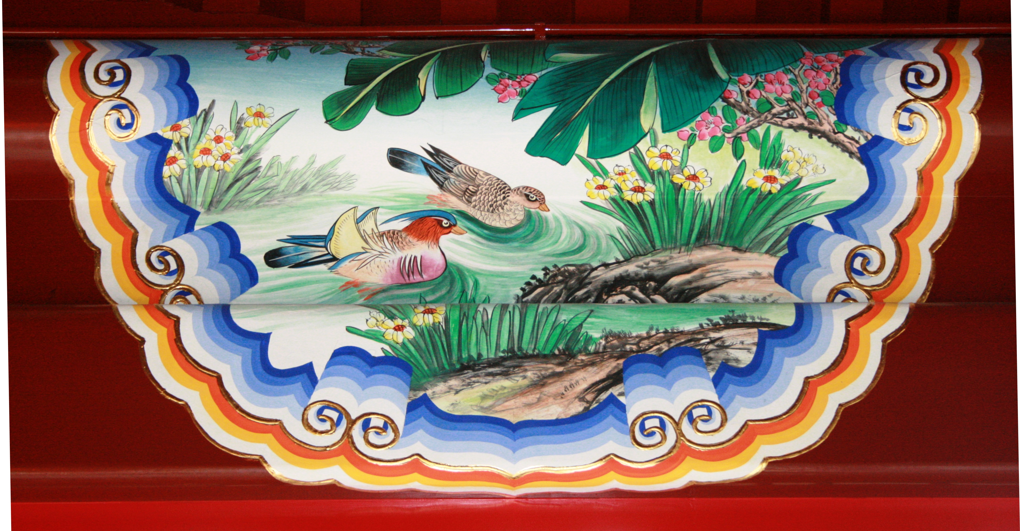 Malowidło na gzymsie pawilonu w Ogrodzie Chińskim w Łazienkach